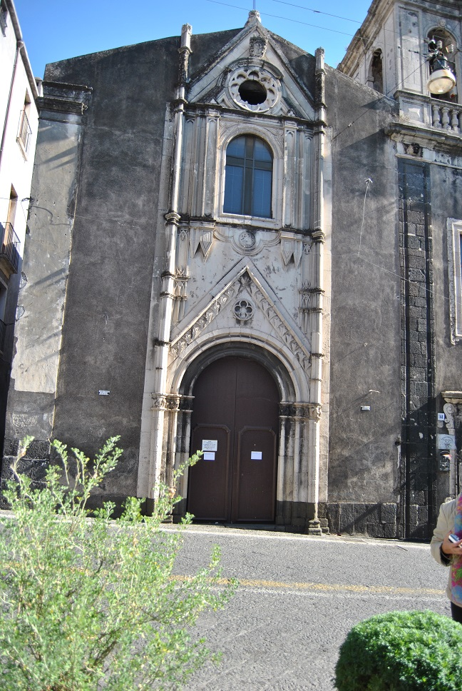 Facciata della chiesa di Sant'Antonio di Padova ad Acireale (1472).